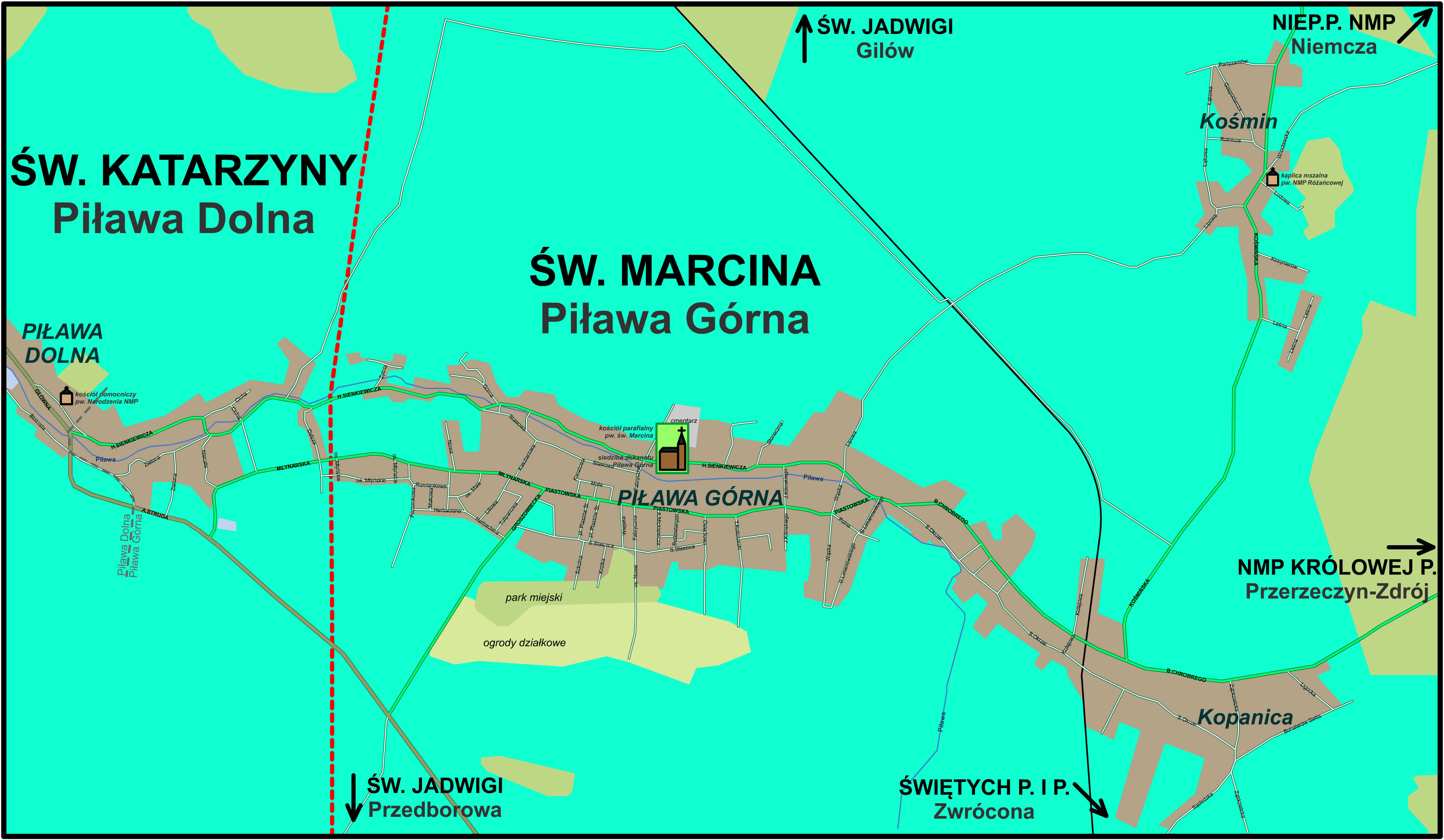 Mapa parafii św. Marcina z Tours, Biskupa, w Piławie Górnej